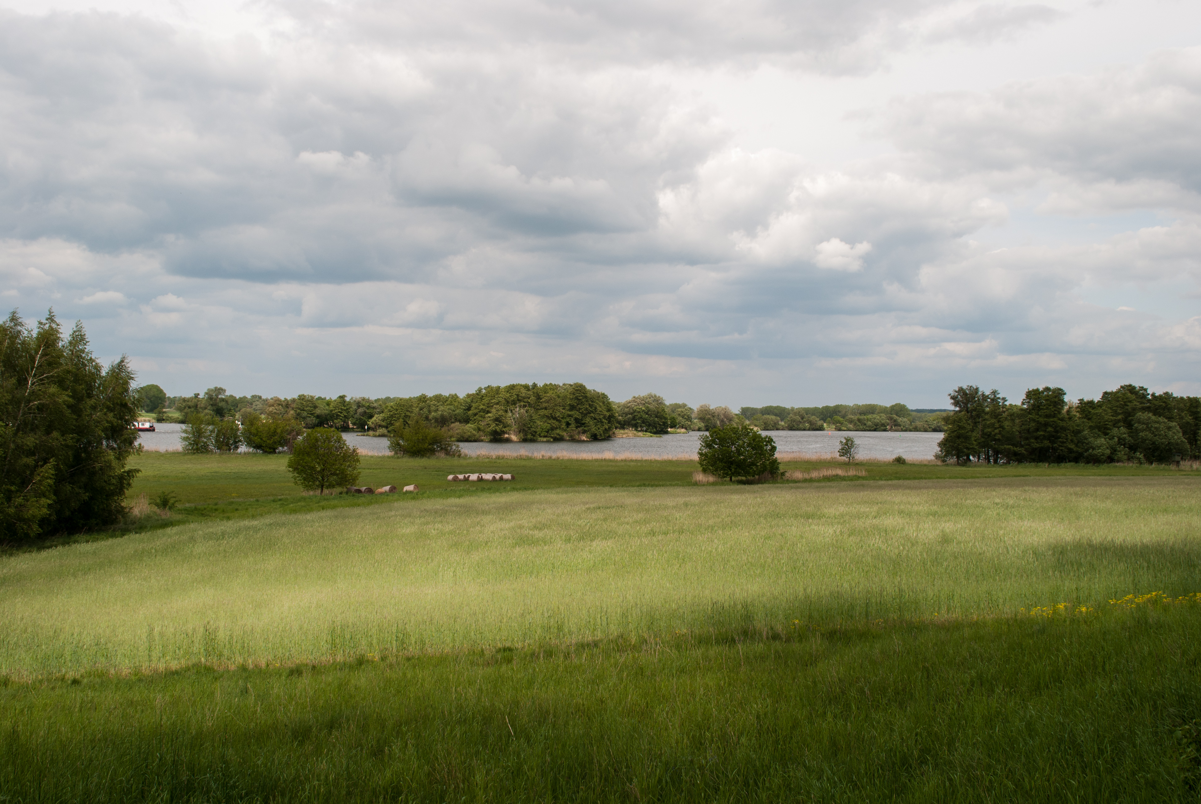 Blick vom Golmberg zwischen Götz und Götzer Berge auf die Havel, LSG Brandenburger Osthavelniederung